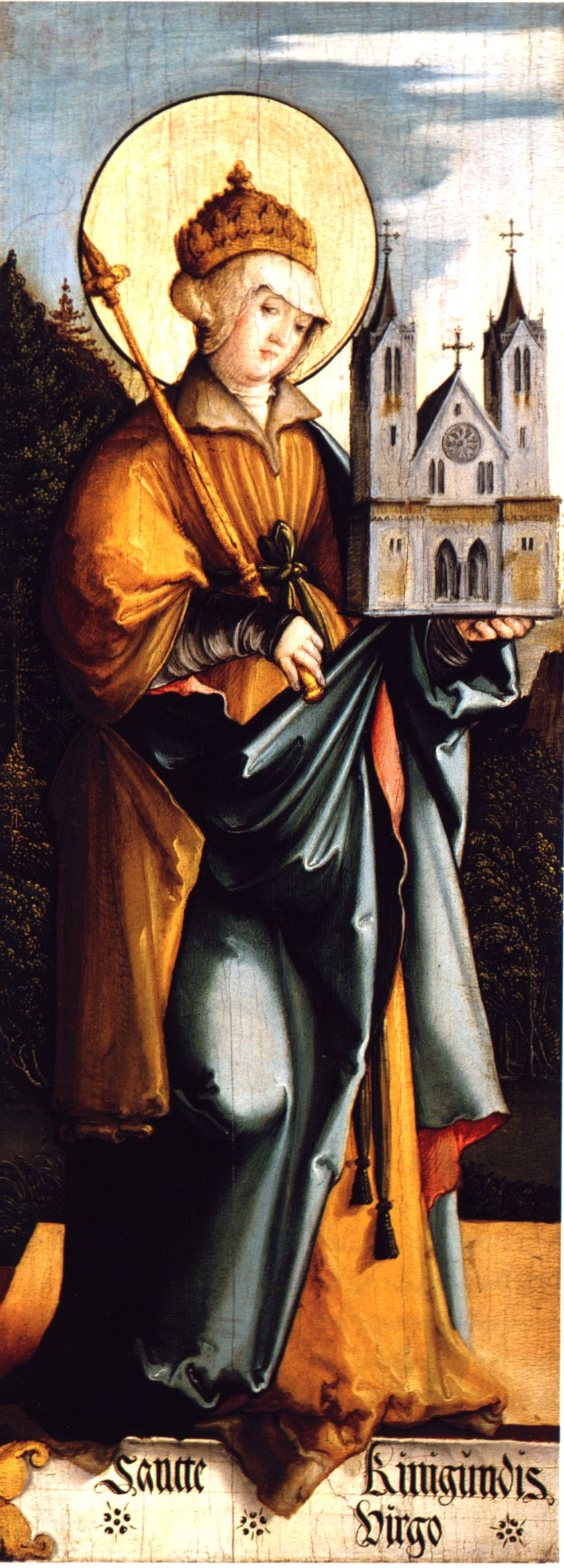 Ausstattung der ehemaligen Seitenaltäre der Meßkircher St. Martinskirche, Standflügel: Heilige Kunigunde als Kaiserin und Stifterin